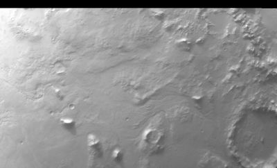 Bild stammt von der NASA; NASA-Fotos sind als Public Domain freigegeben